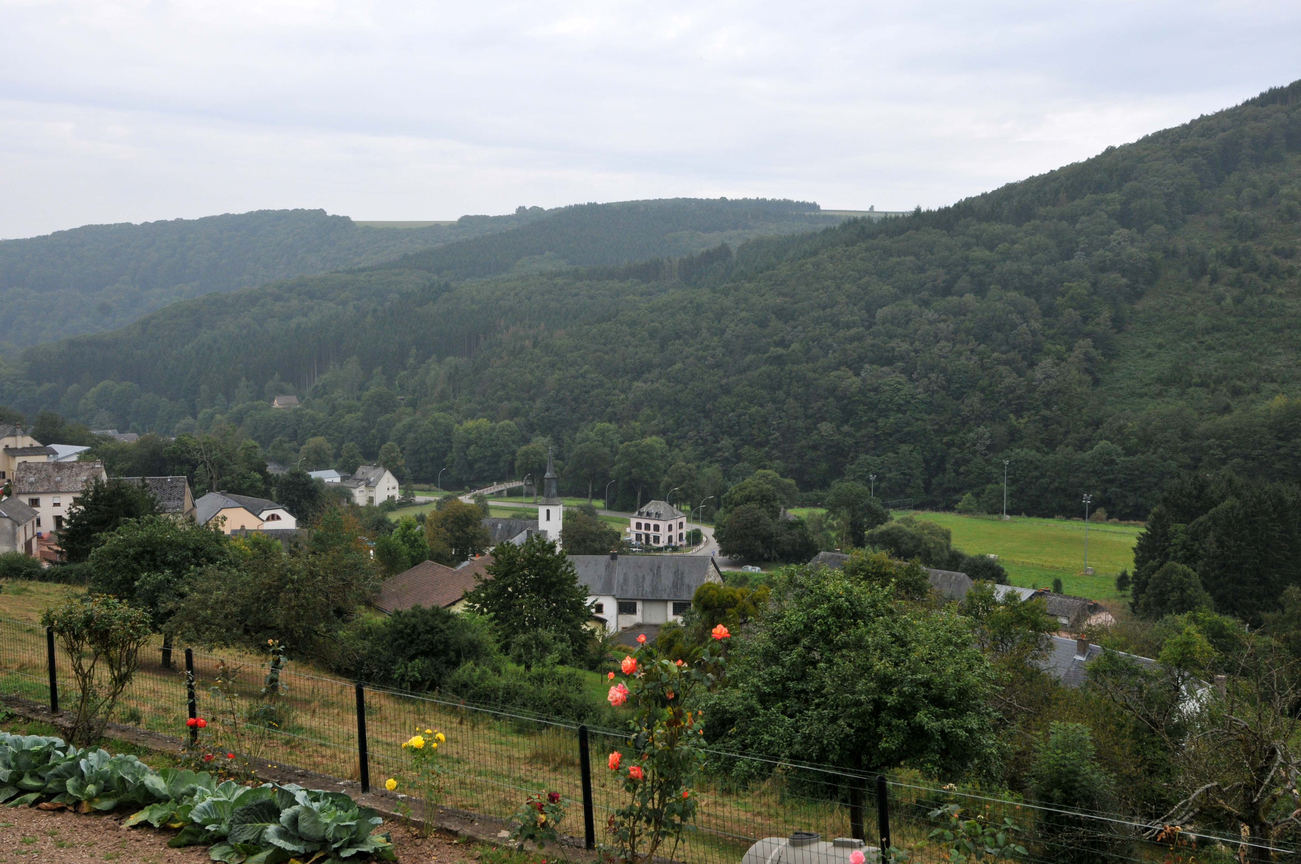 Vue op Méchela.